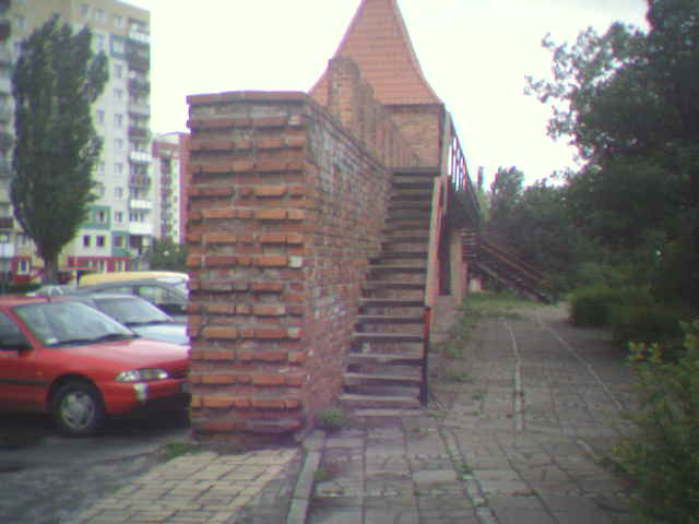 Głogów, fragment murów z Basztą niedaleko zamku Książąt Głogowskich